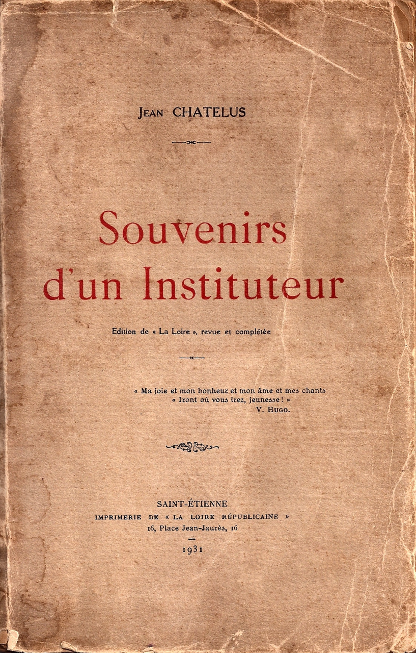 Jean Châtelus (Mathieu Fournier, 1868-1963), Souvenirs d'un instituteur, 1931.